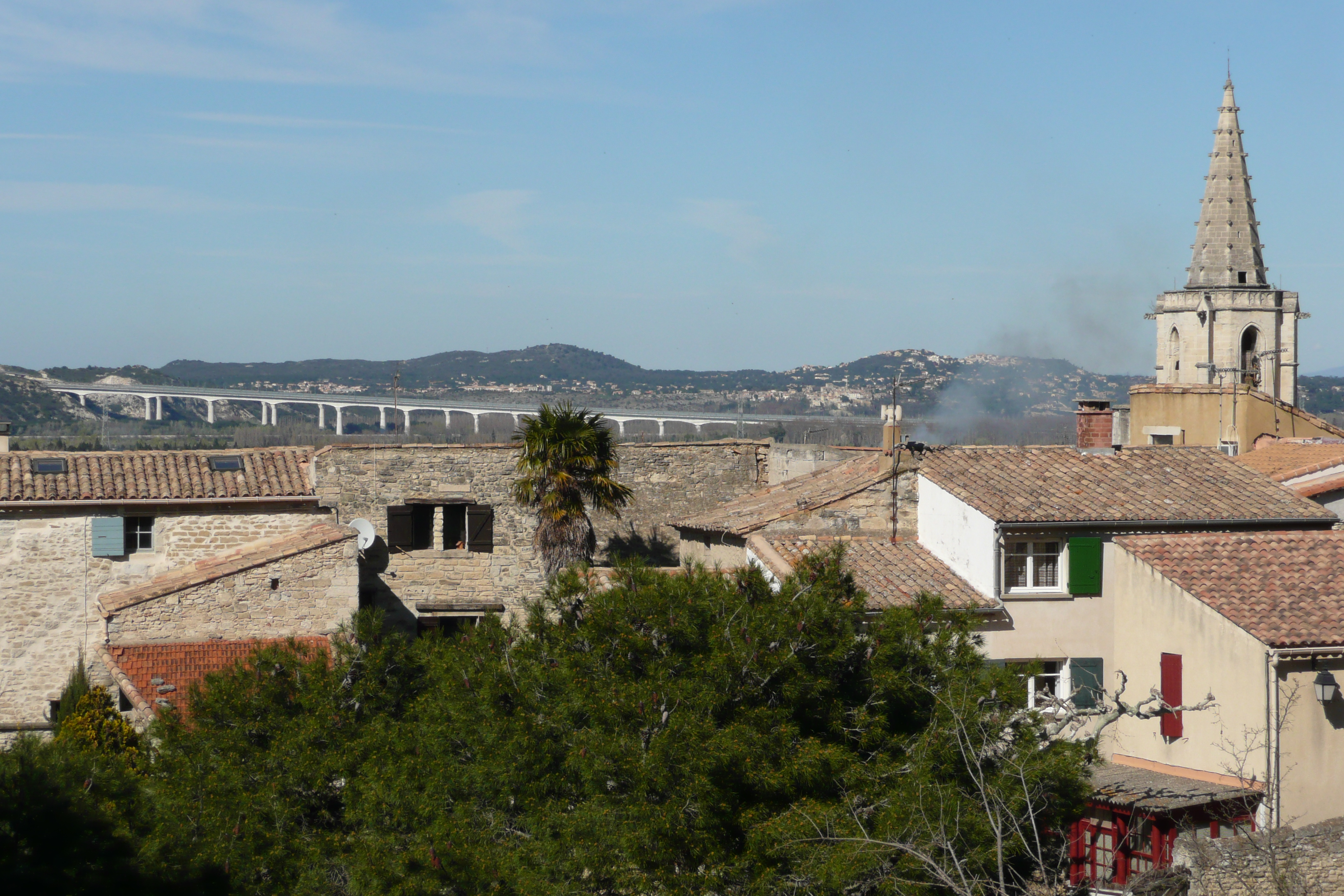 Vue sur Barbentane.